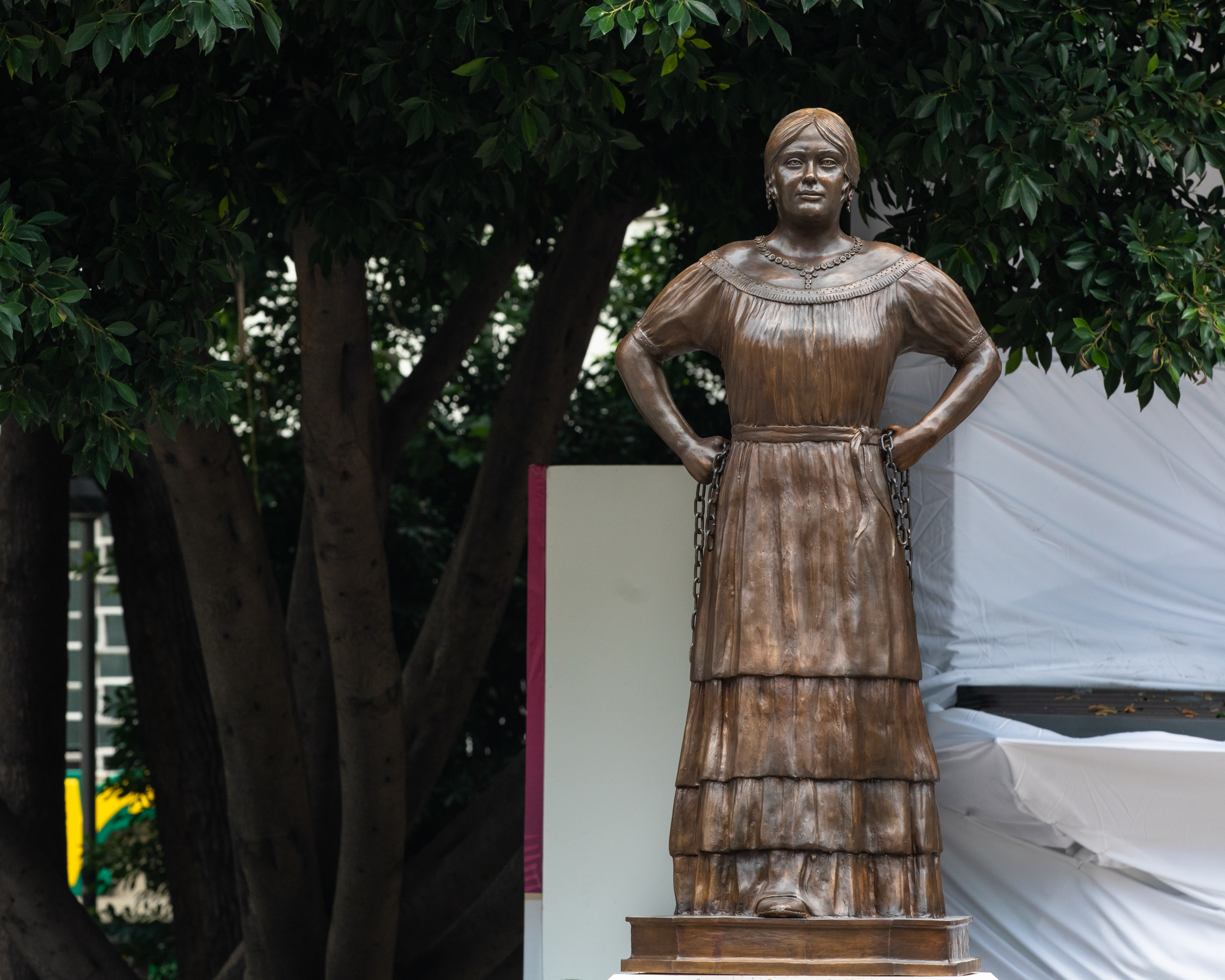 Leona Vicario fue una de las figuras más destacadas de la Guerra de Independencia de México, durante la cual se dedicó a informar a los insurgentes de todos los movimientos que podían interesarles y que ocurrían en la capital del virreinato.